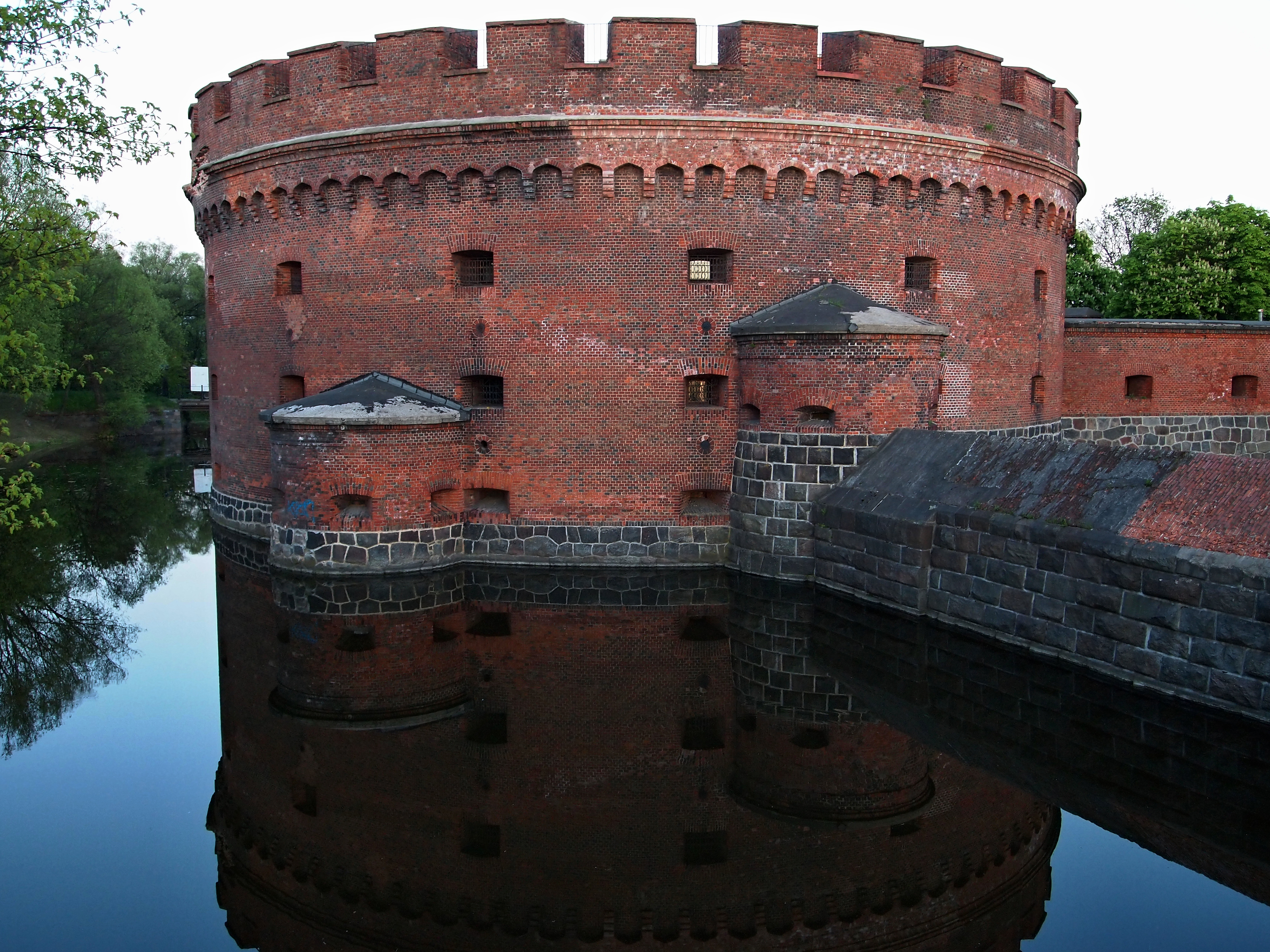 Башня "Дер-Дона", на которой 10 апреля 1945 г., было водружено знамя Победы: улица Черняховского, Калининград, Калининградская область